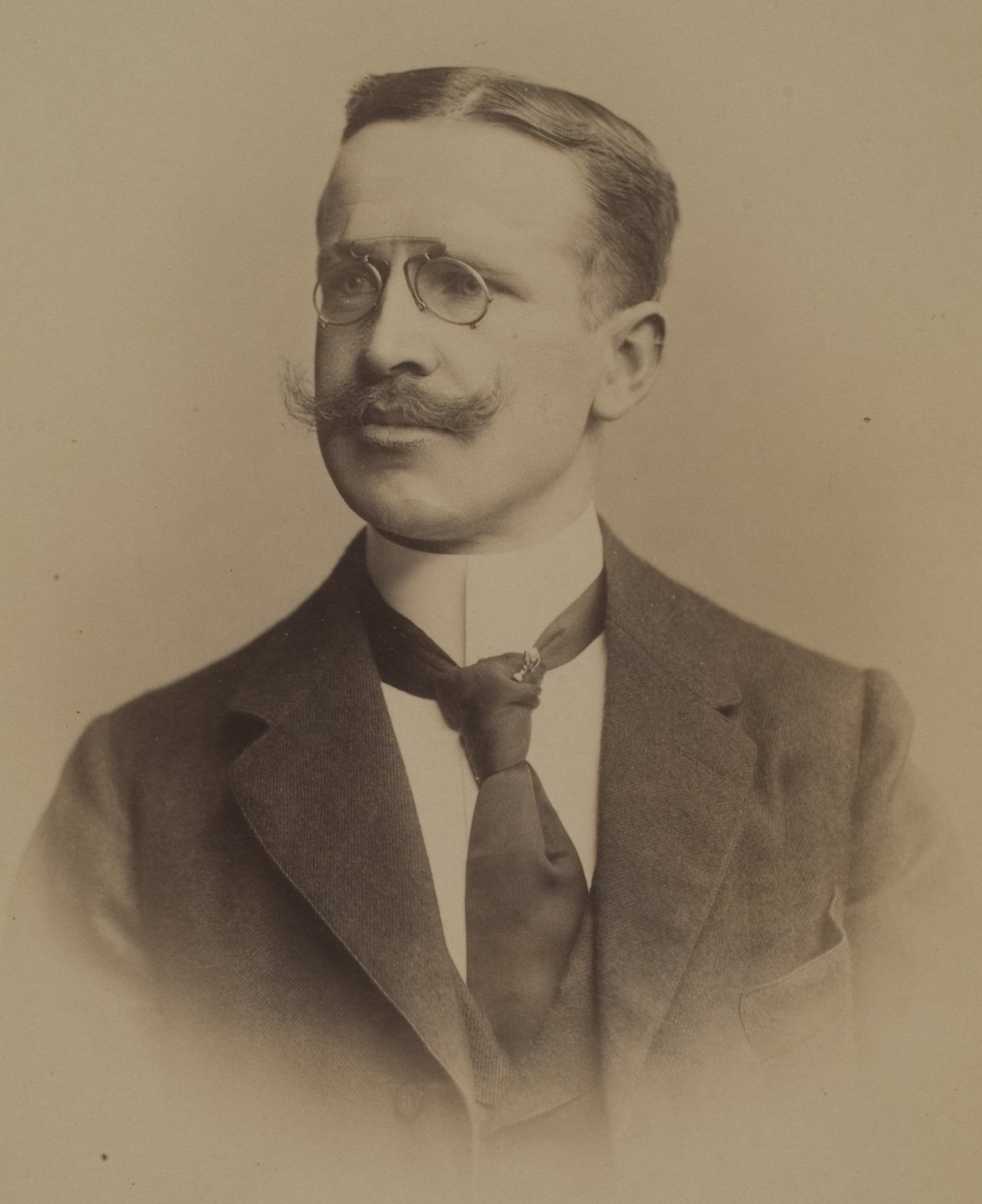 Bernhard von Beck, Chirurg, 1896–1901 Professor in Heidelberg, 1897–1930 Direktor des Städtischen Krankenhauses in Karlsruhe